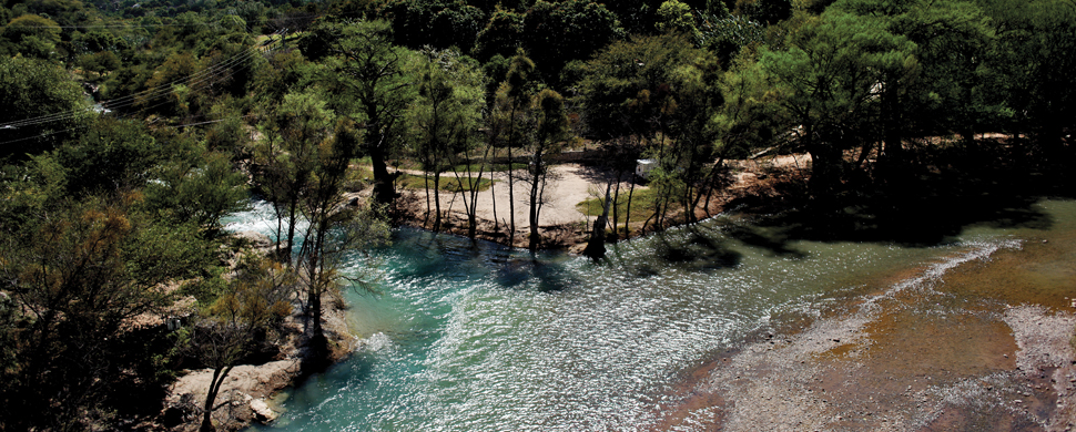 Las Adjuntas, Arroyo Seco